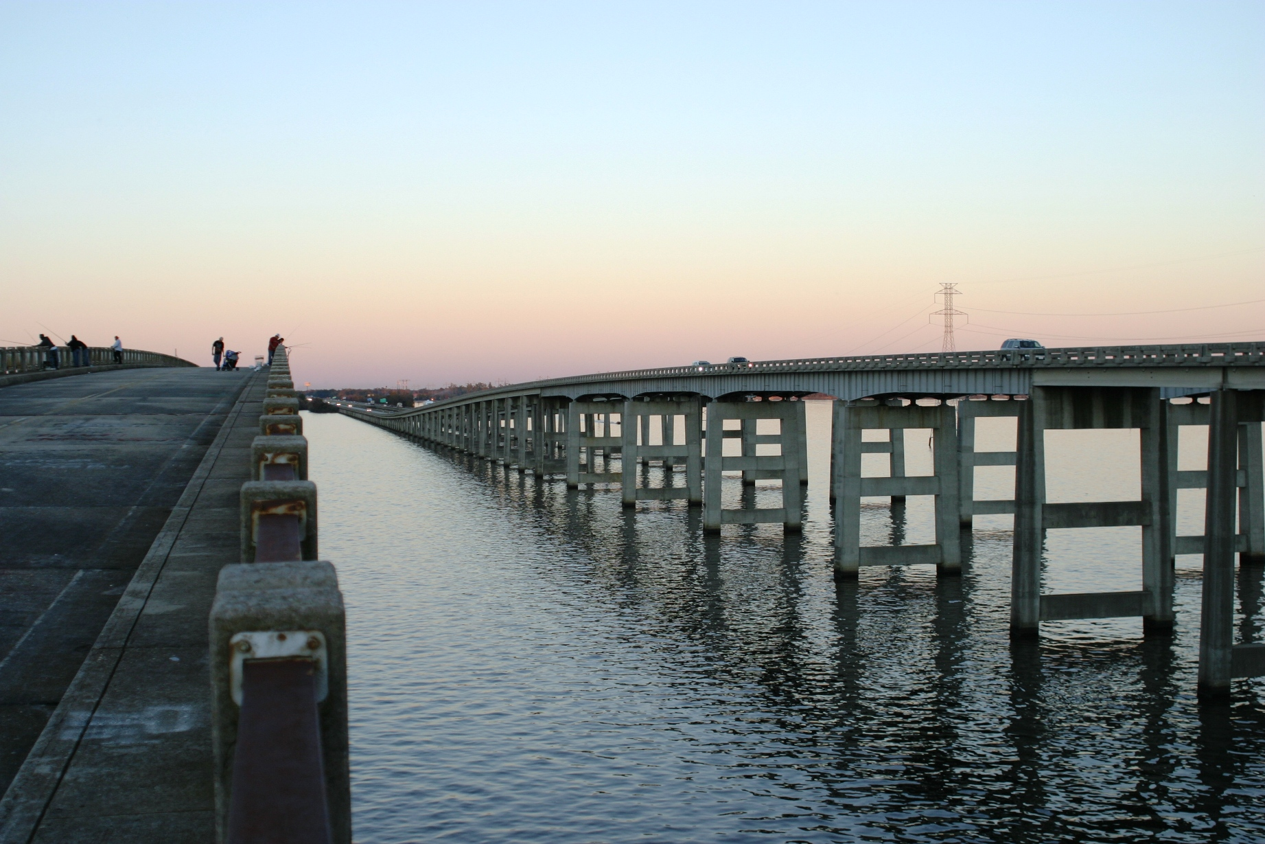 Interstate 95 bridge over Lake Marion, Santee, SC